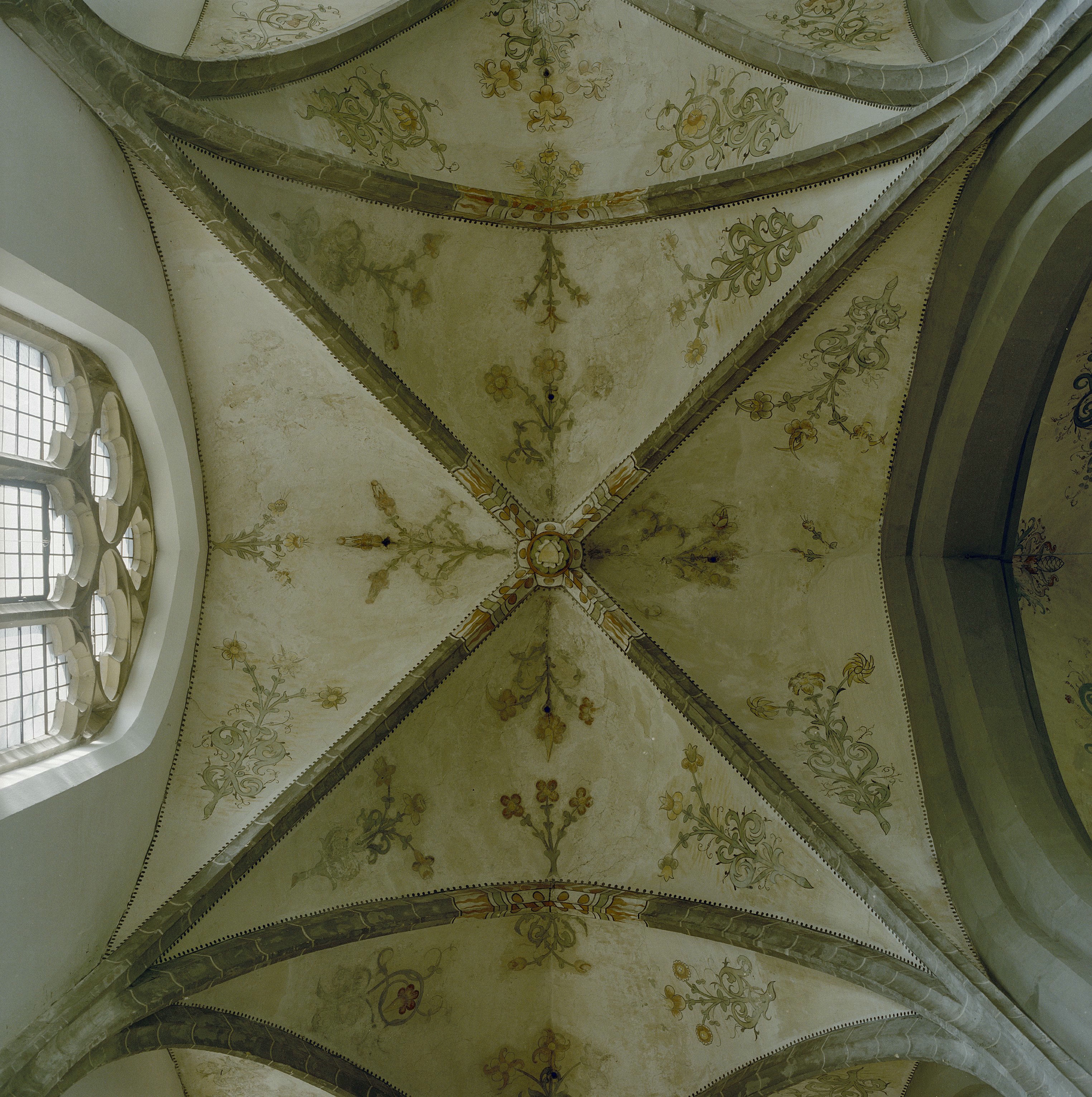 Minderbroederkerk: INTERIEUR, GEWELFSCHILDERINGEN, NR. 2-3